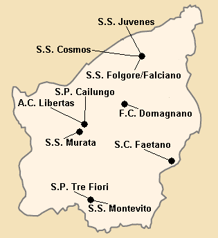 Répartition des clubs en Serie A1 1991-1992.